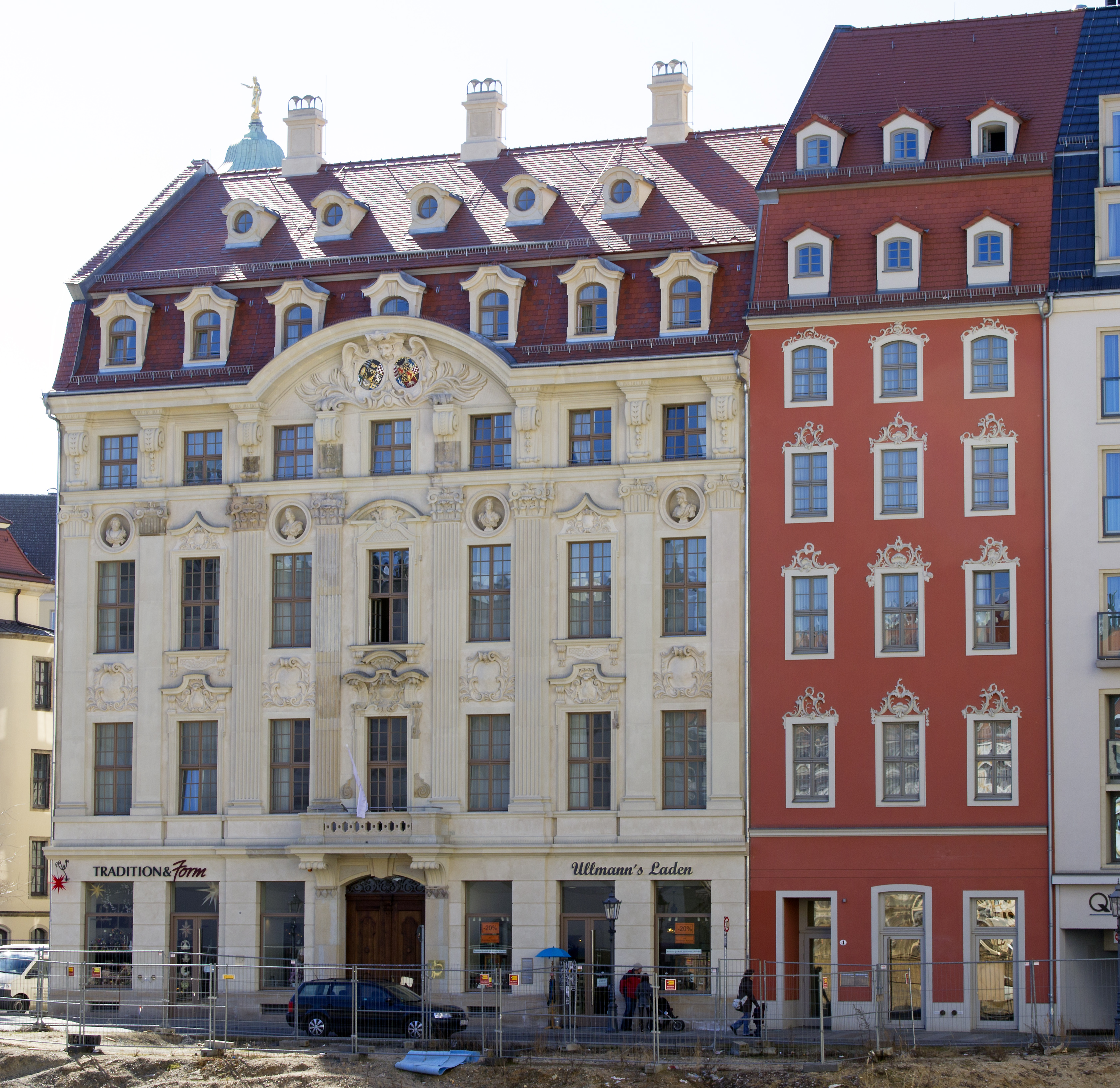 Landhausstraße 4 (rechts), British Hotel (links) in Dresden